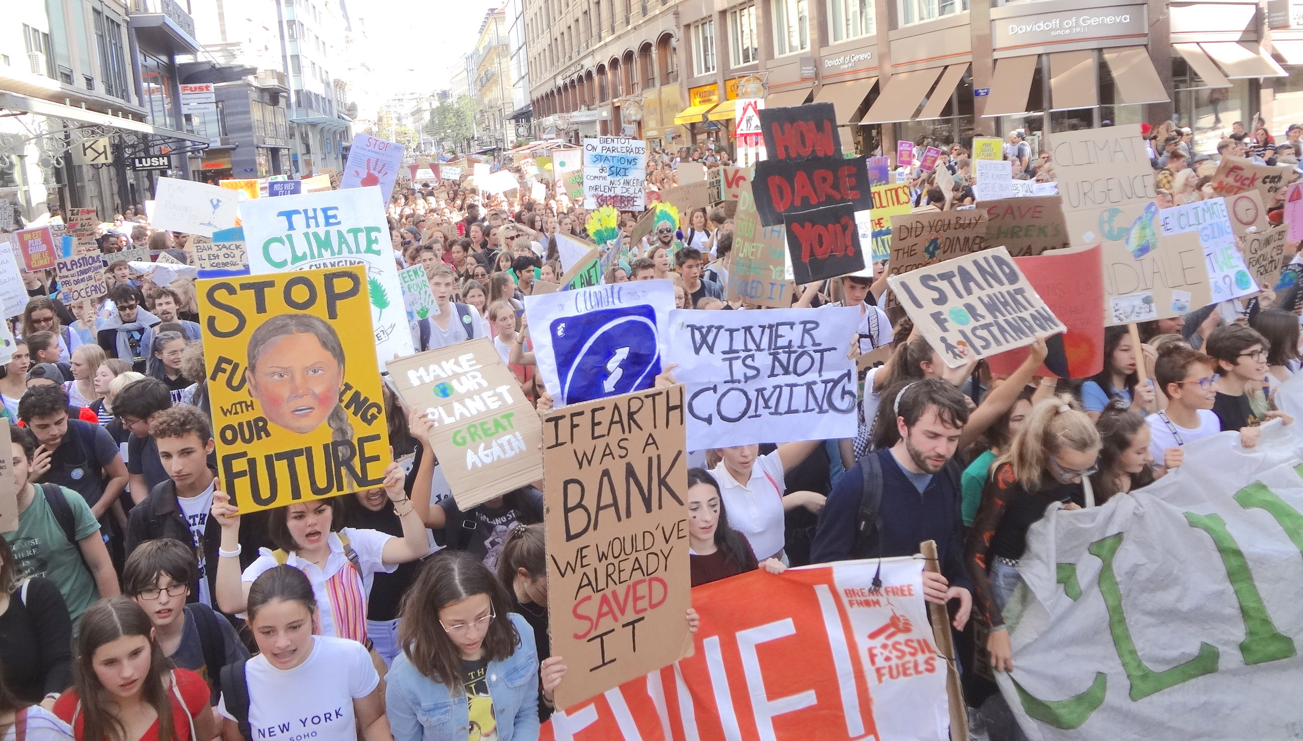 Manifestation pour le climat et grève des étudiants à Genève le vendredi 27 septembre 2019. Rues basses.